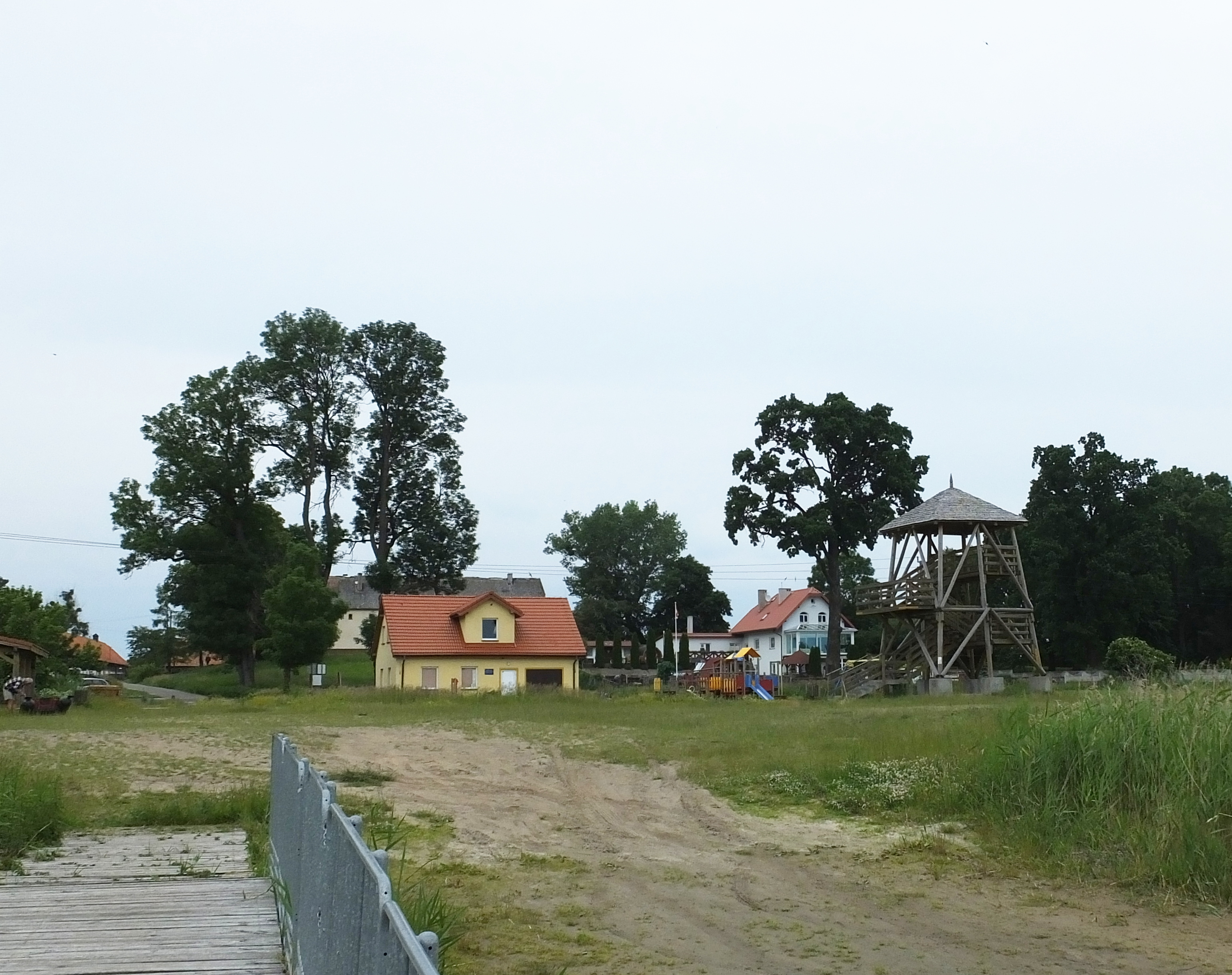 Wiejskie Centrum Kulturalno-Społeczne i wieża widokowa nad jeziorem Kocioł w Kociołku Szlacheckim.